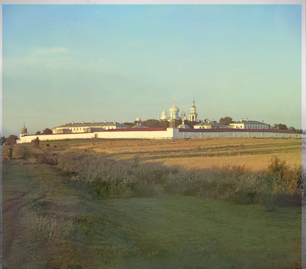 Fyodorovsky Monastery in Pereslavl